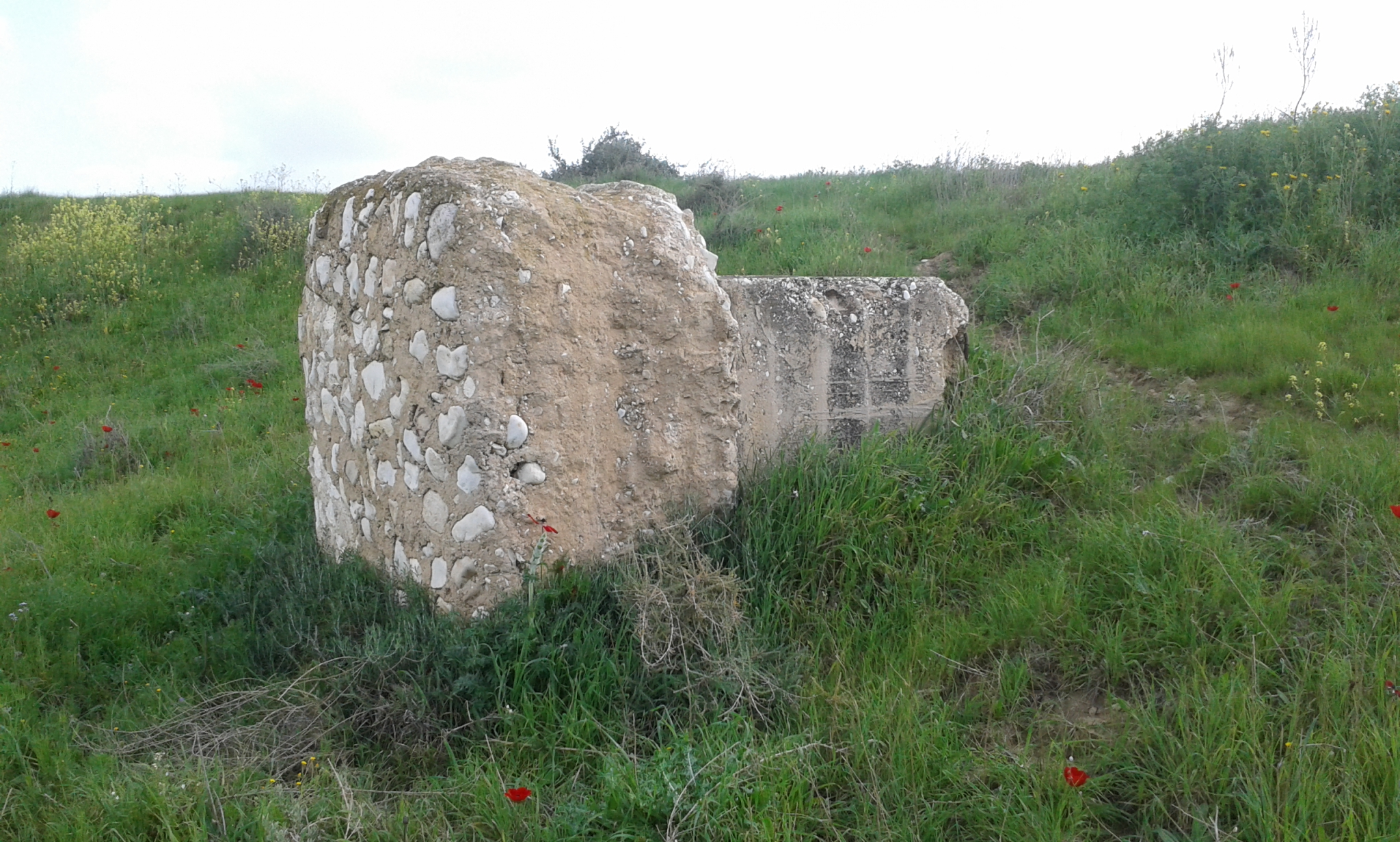 יסודות הבטון של גשר הרכבת הטורקית לייד תל שרע (תל א-שריעה)